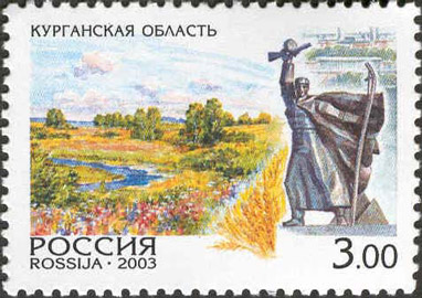 Почтовая марка России